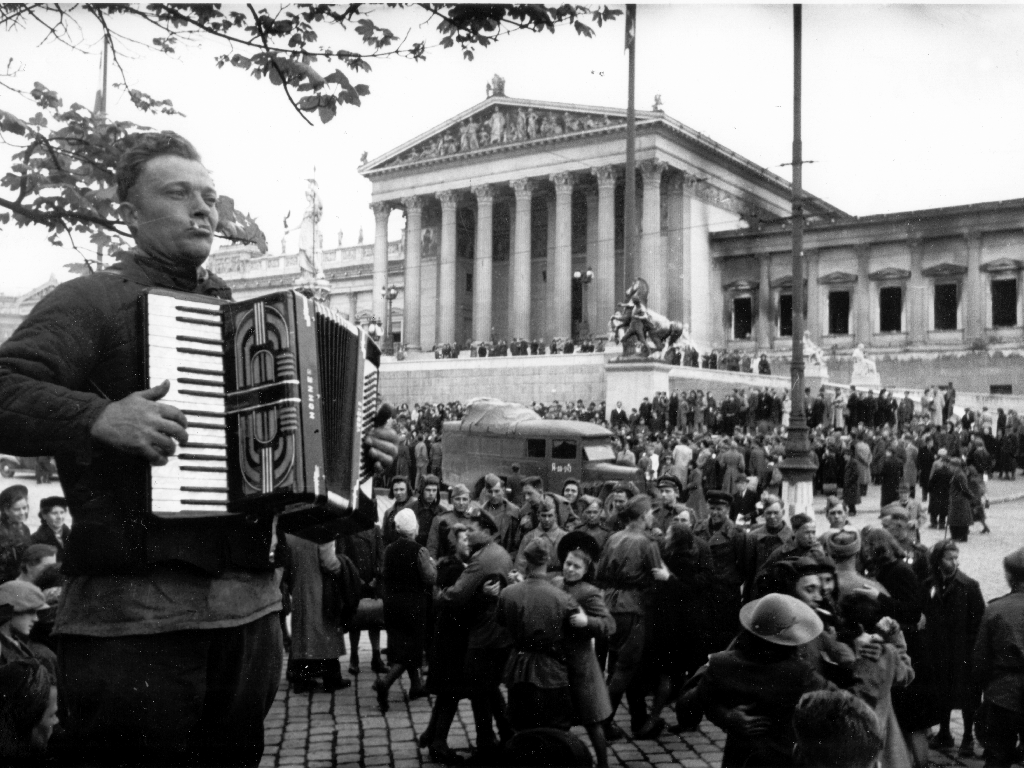 Мирные будни в послевоенной Вене